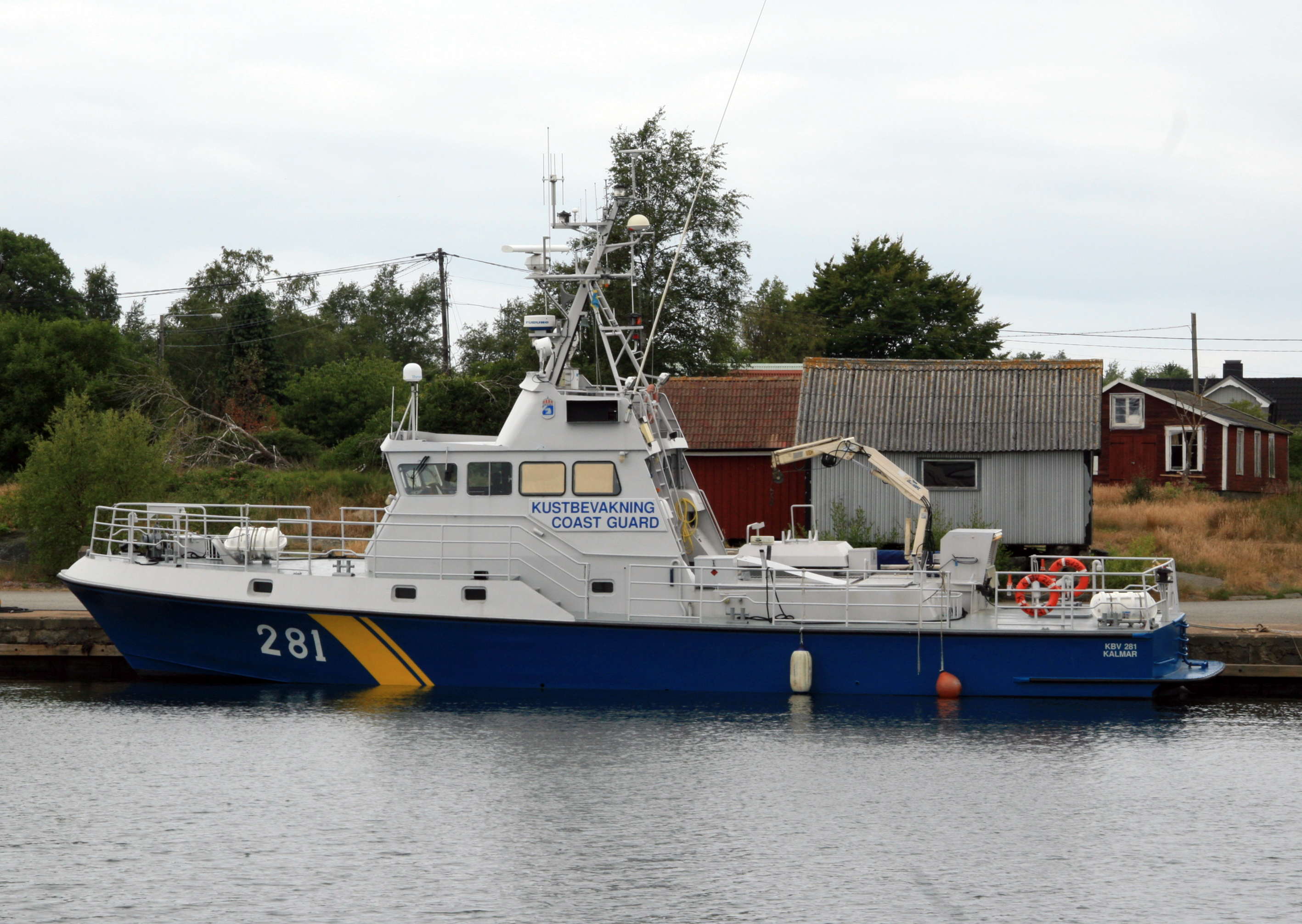 KBV 281 i Garpahamnen, Hasslö 15 juli 2008